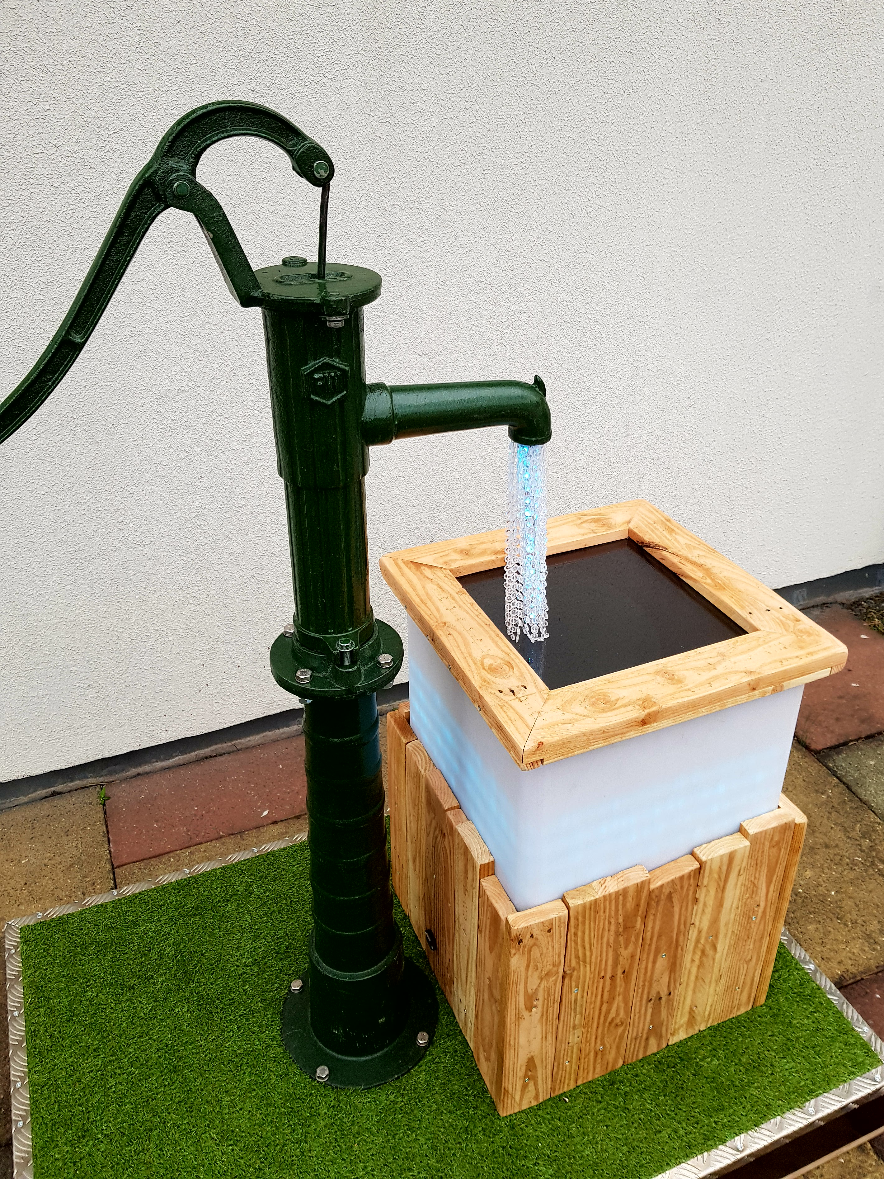 Daten sind das neue Grundwasser!